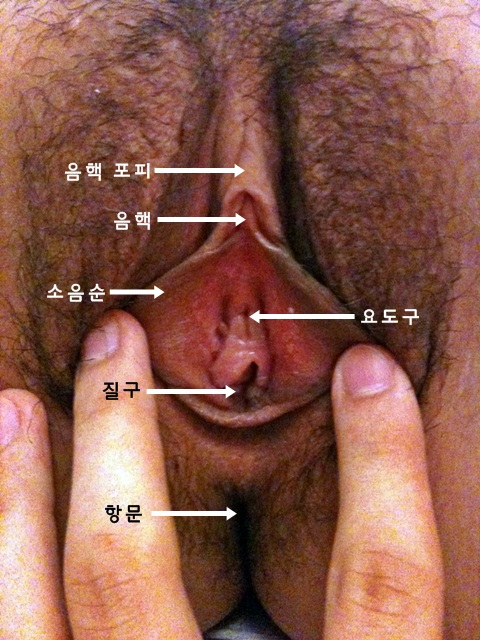 여성의 외음부